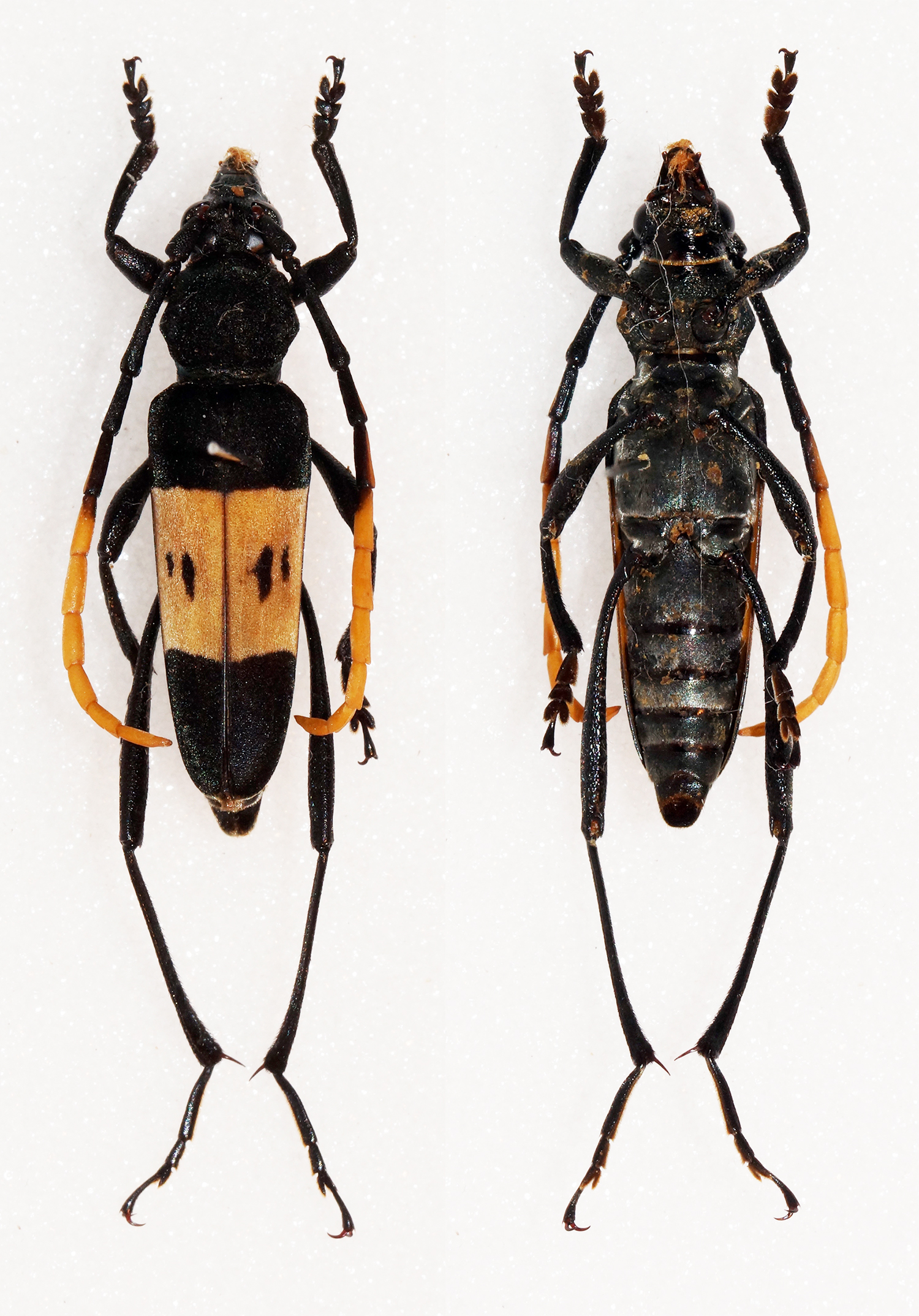 Abang & Vives,2004 Sex: ? Data: 03-12-11 - Ranau - Sabah - Malaysia Size: 20.5mm